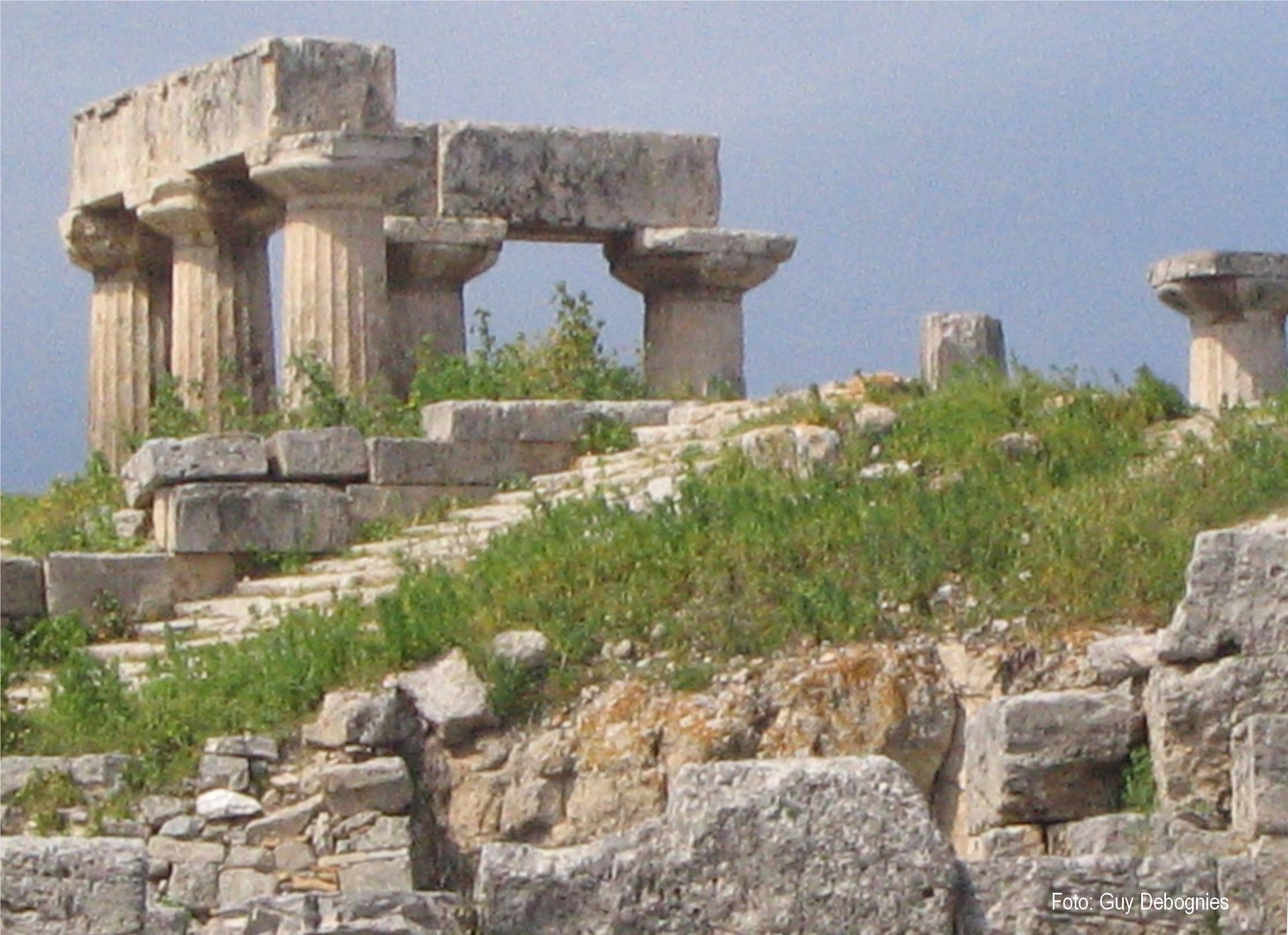 april 2005 Categorie:Afbeelding oudheid